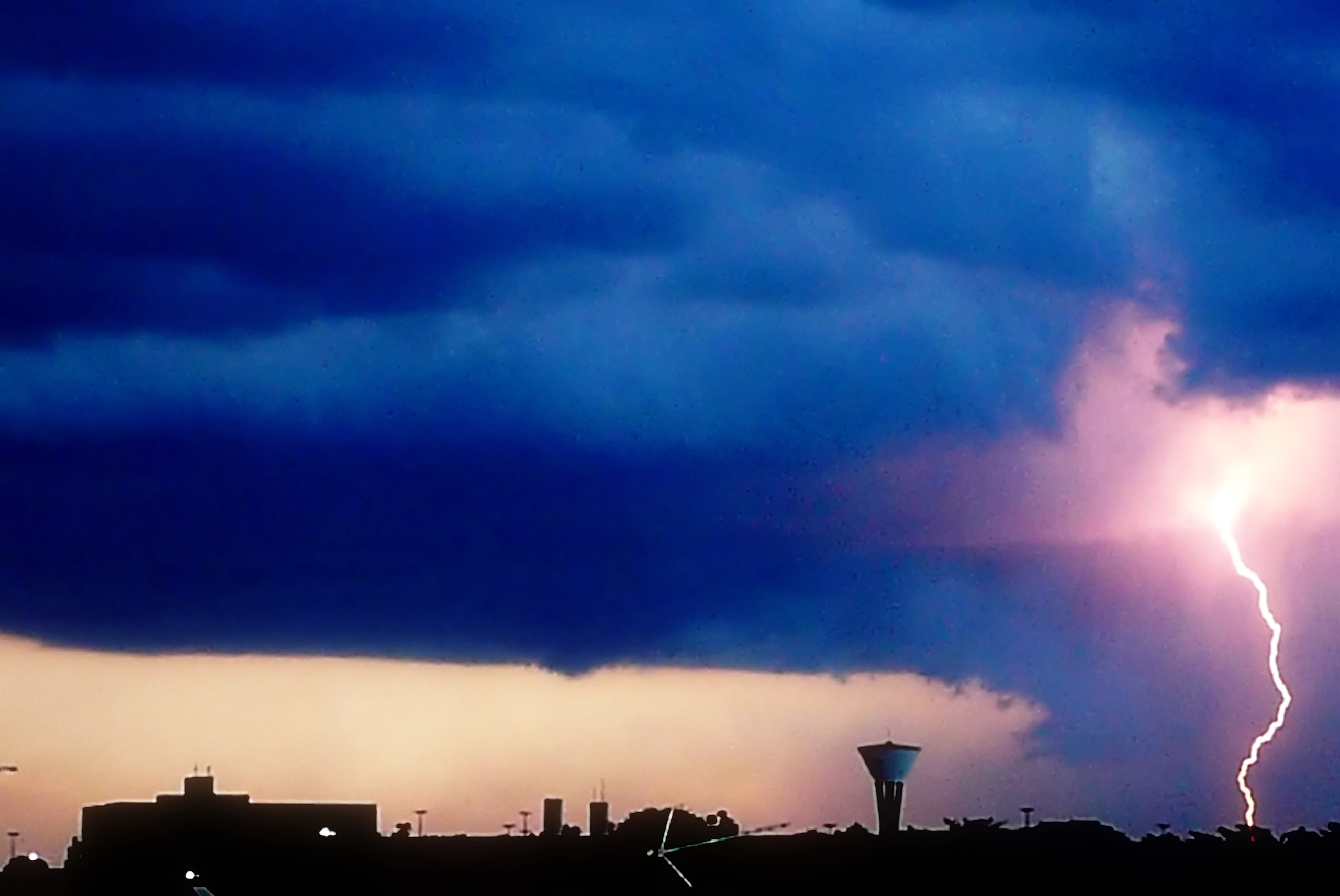 Raio em Araras, caindo perto da faculdade no Jd. Universitário